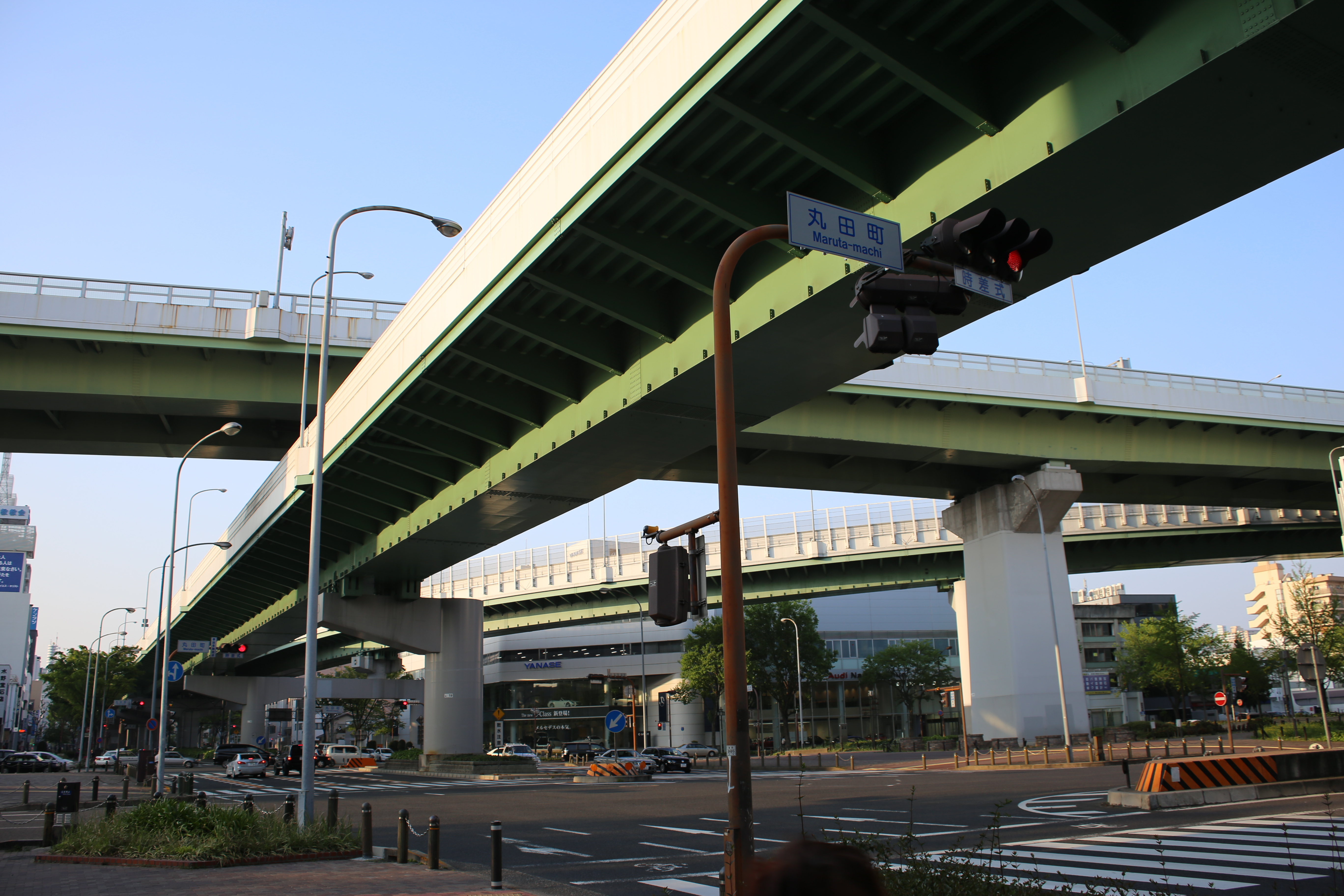 名古屋市中区千代田五丁目の名古屋高速道路丸田町ジャンクションを南西側より撮影